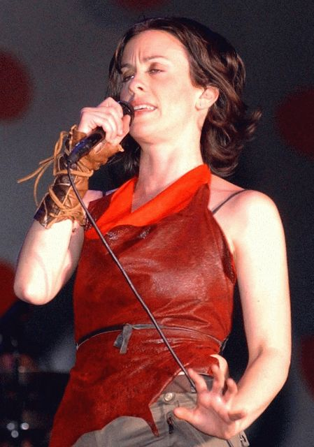 A cantora canadense Alanis Morissette durante apresentação no Brasília Music Festival.